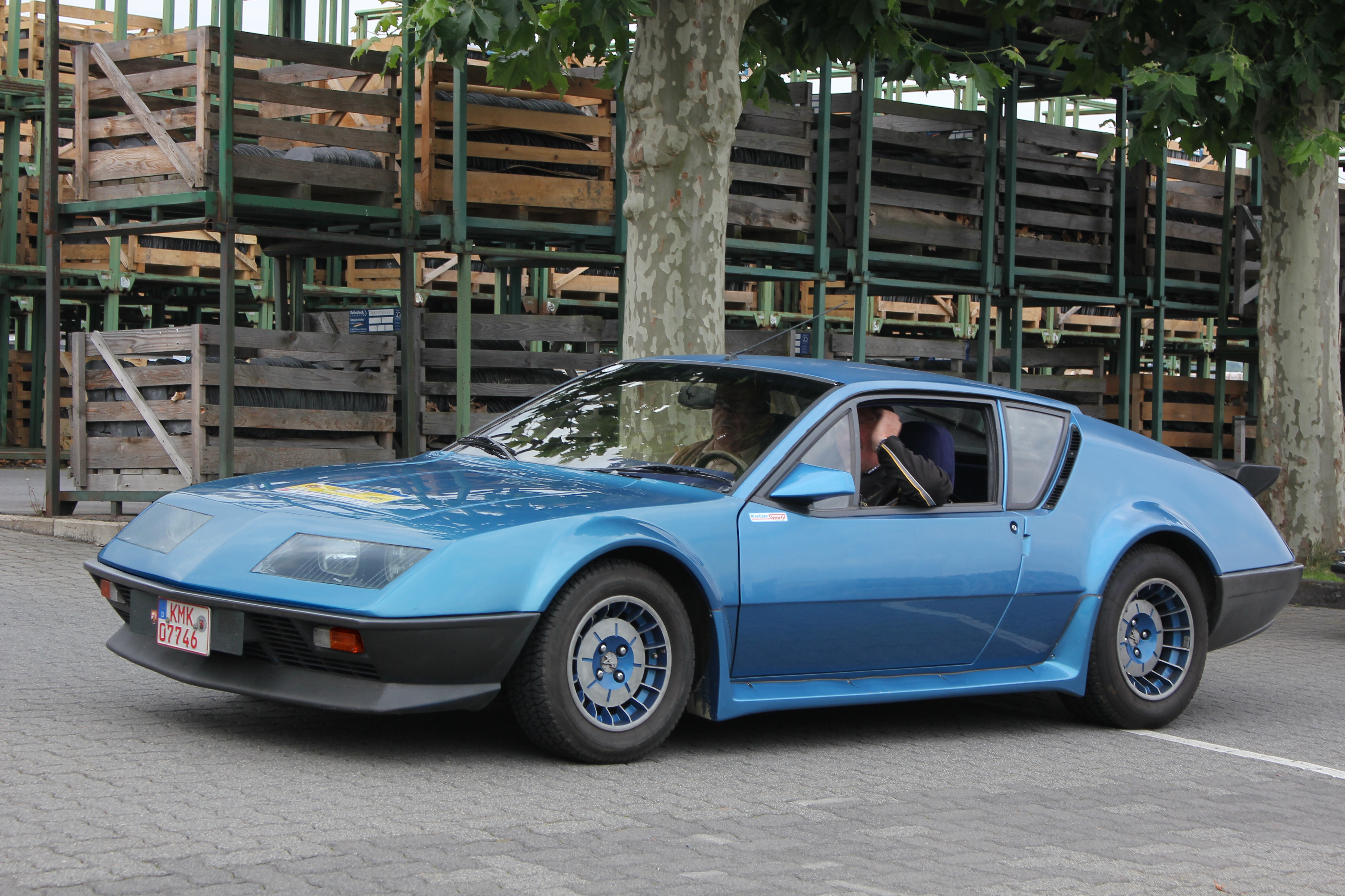 Alpine A 310 V6, Baujahr 1982, bei der ADAC Moselschiefer-Classic 2015 (Kennzeichen des Fahrzeugs verändert)